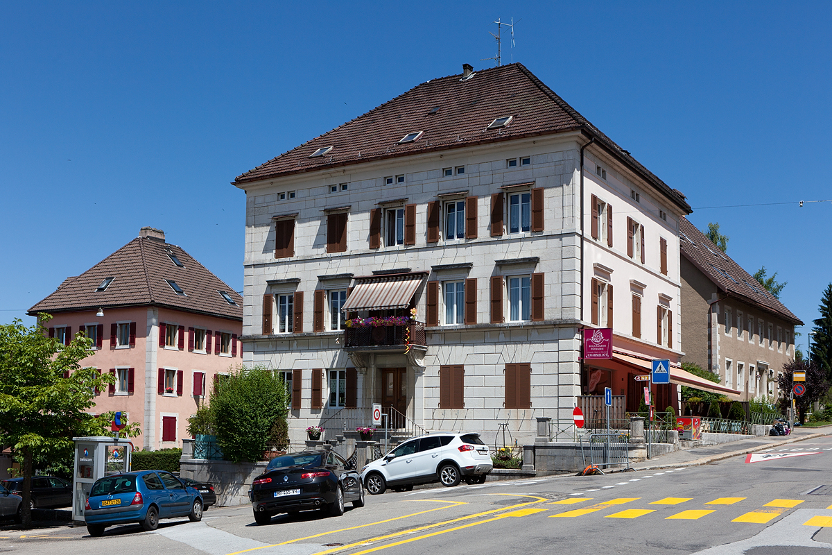 Grand'Rue in Les Brenets (NE)